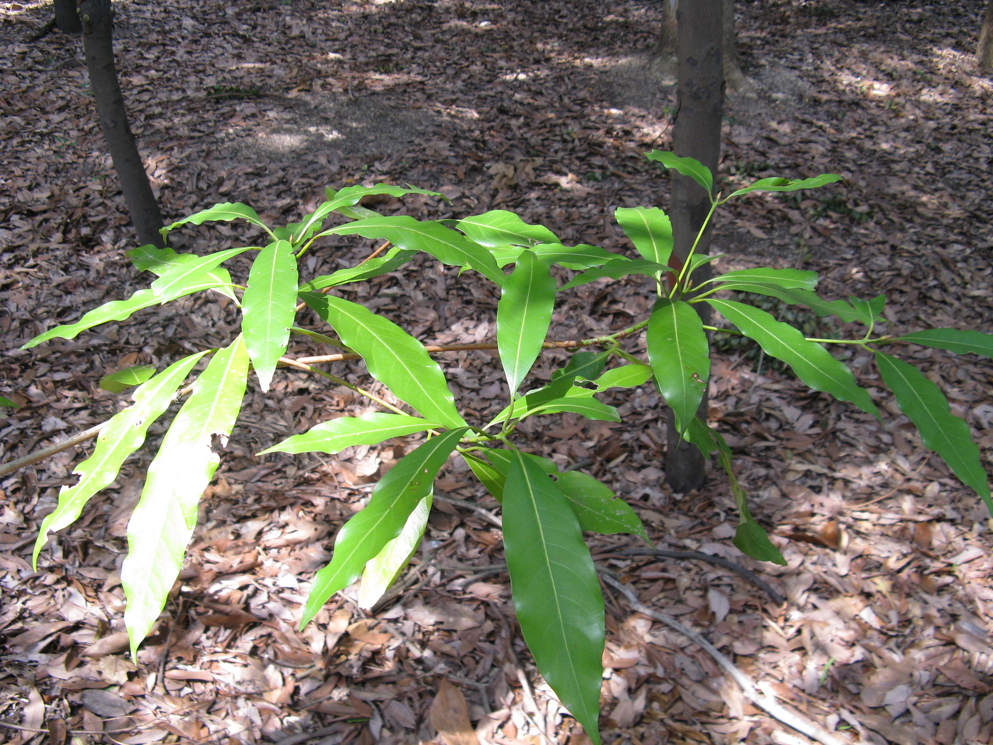 Persea japonica (syn. Machilus japonica)